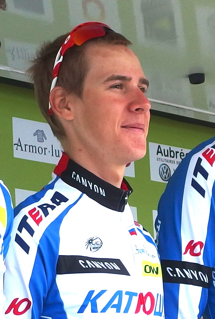 Tour de Bretagne 2015 - Présentation des équipes au départ de la troisième étape à Baud - Équipe Itera-Katusha Depicted person: Matvey Mamykin